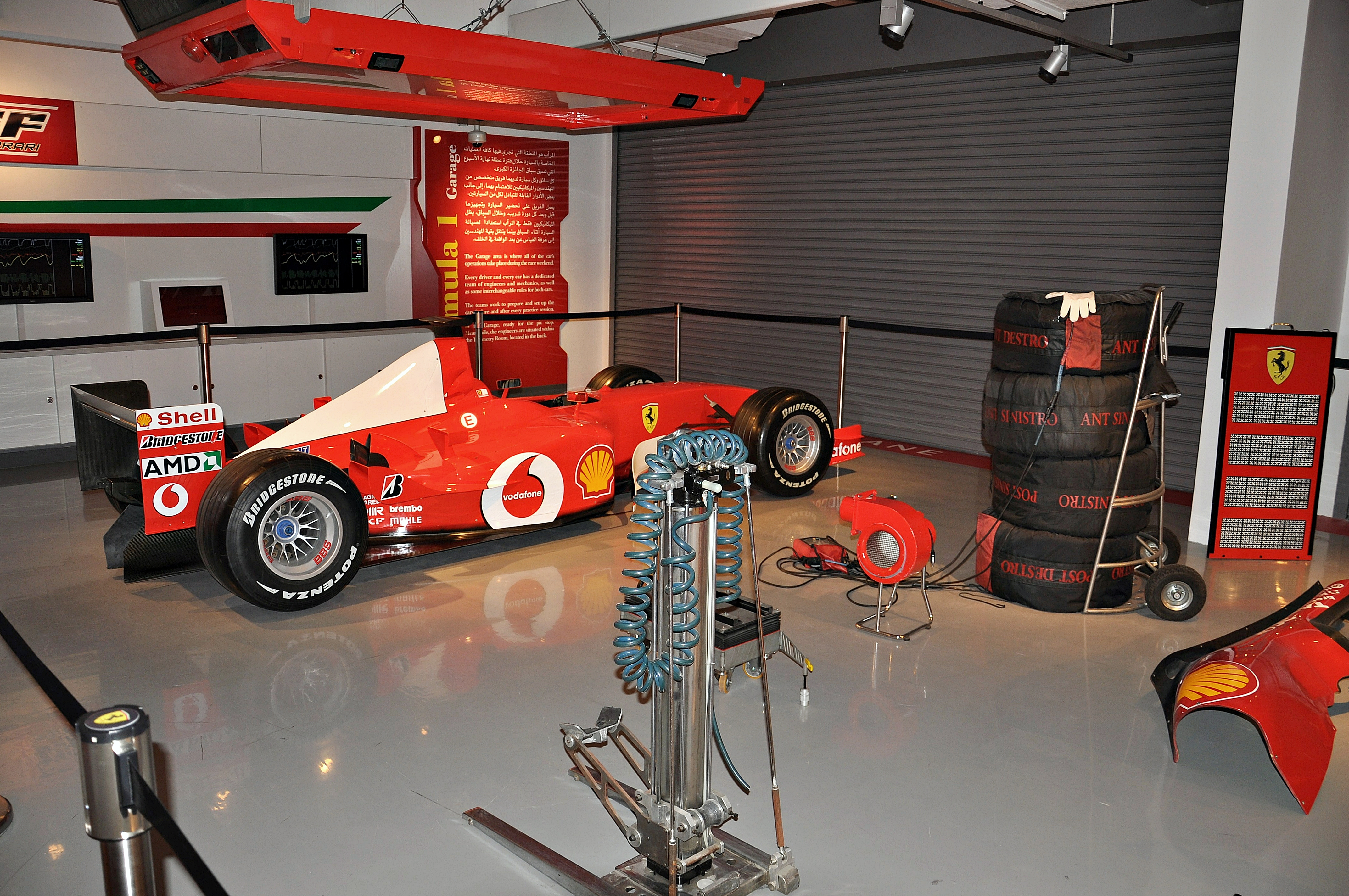 emiratos arabes